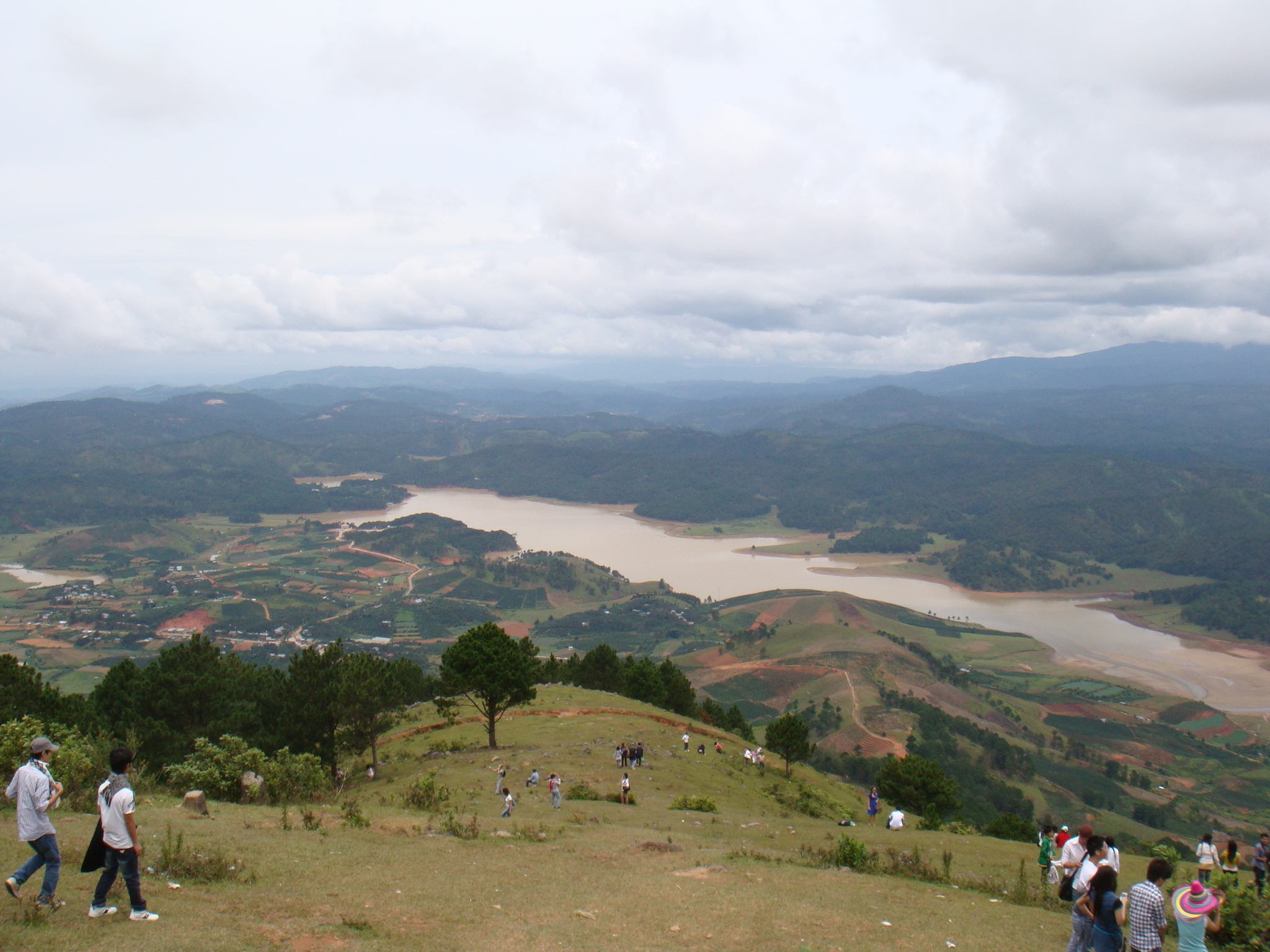 Lang Biang mountain in Da Lat Vietnam